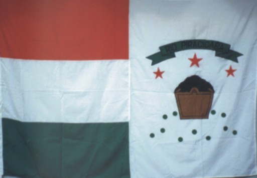 Bandeira do município de Rio Piracicaba, em Minas Gerais, Brasil.